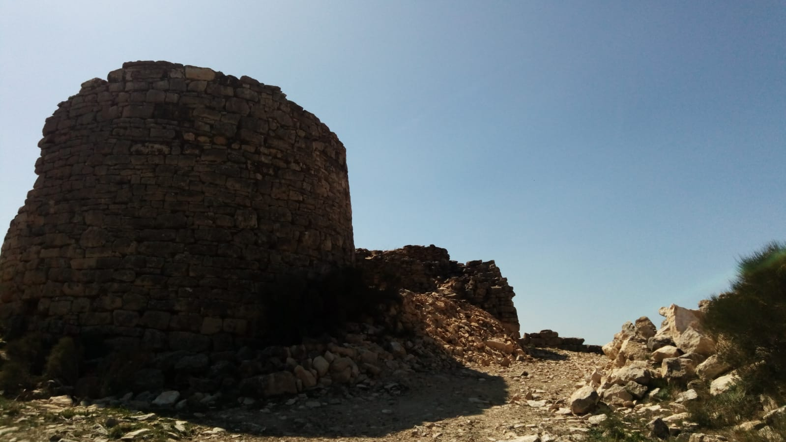 Torreón de la muralla interior